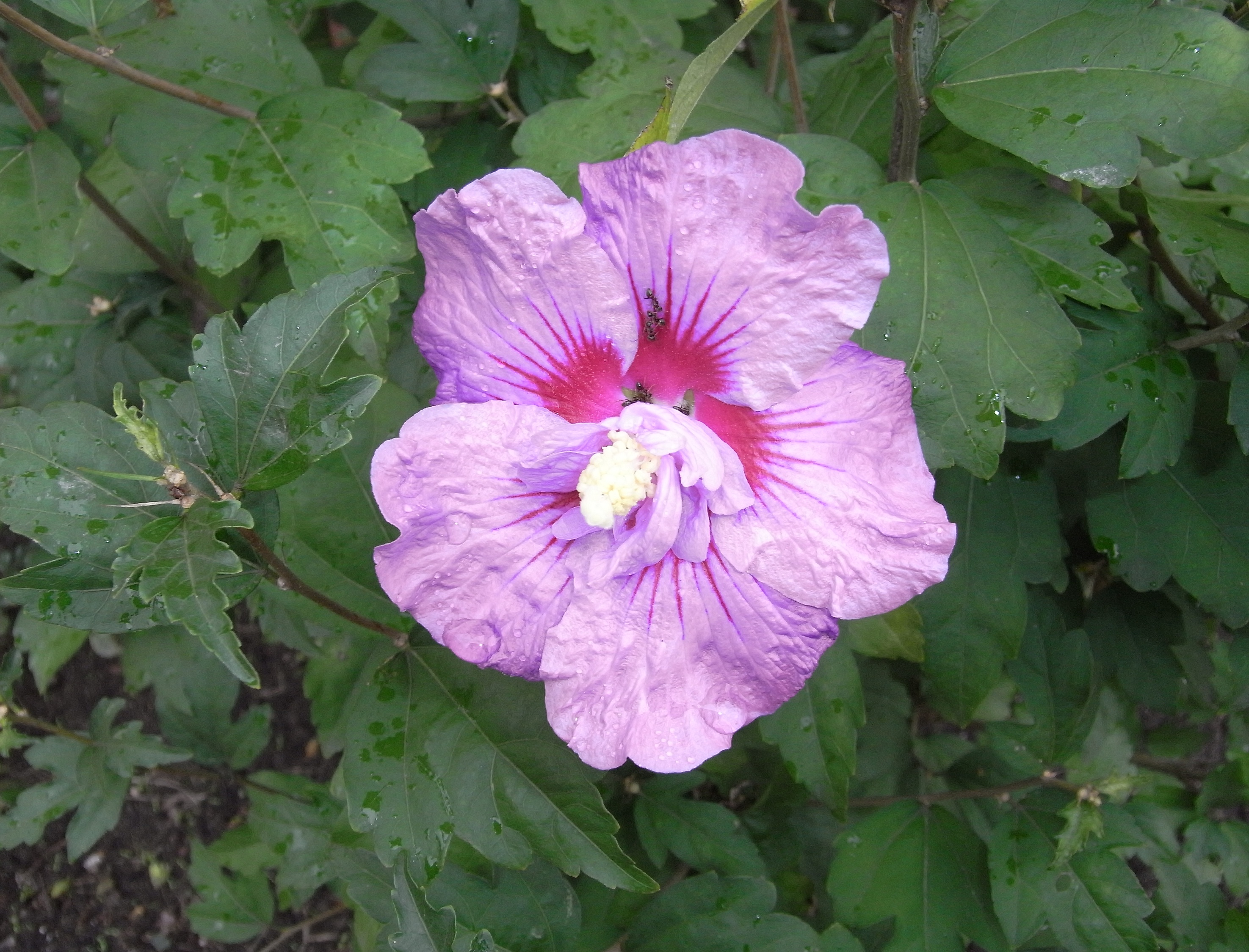 Straucheibisch